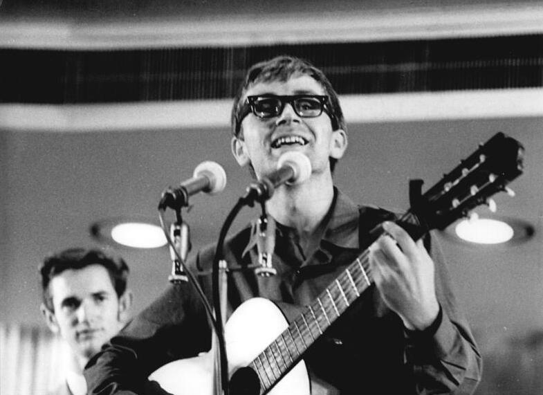 Zentralbild Katscherowski 4.11.1968 Berlin: Bei der Abschlußveranstaltung des V. Literaturfestivals der Berliner Jugend am 3.11.68 in der Kongreßhalle wirkten Reinhold Andert (unser Foto) und weitere Mitglieder des Oktoberklubs sowie zahlreiche andere Berliner Singeklubs mit.